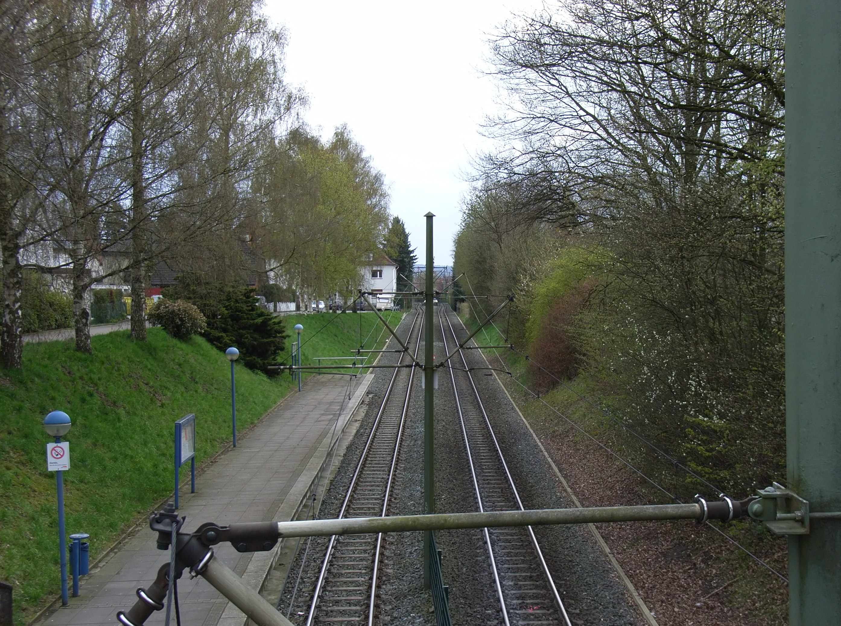 Bielefeld, Deutschland: Trasse der Stadtbahnlinie 1 (im Vordergrund Haltestelle Heidegärten, im Hintergrund Haltestelle Kattenkamp) und ehemalige Trasse der Bielefelder Kreisbahnen.